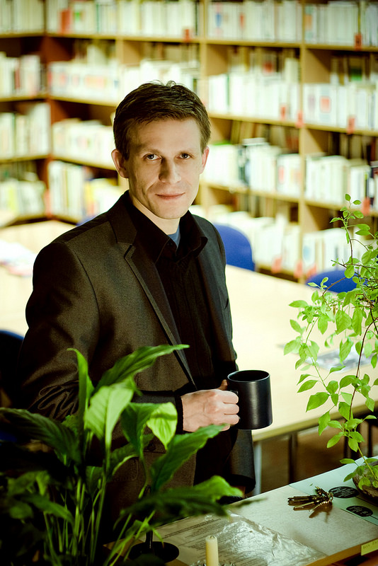 Frankofiil Tanel Lepsoo 2009. aastal Tartus, TÜ Keeltemajas.